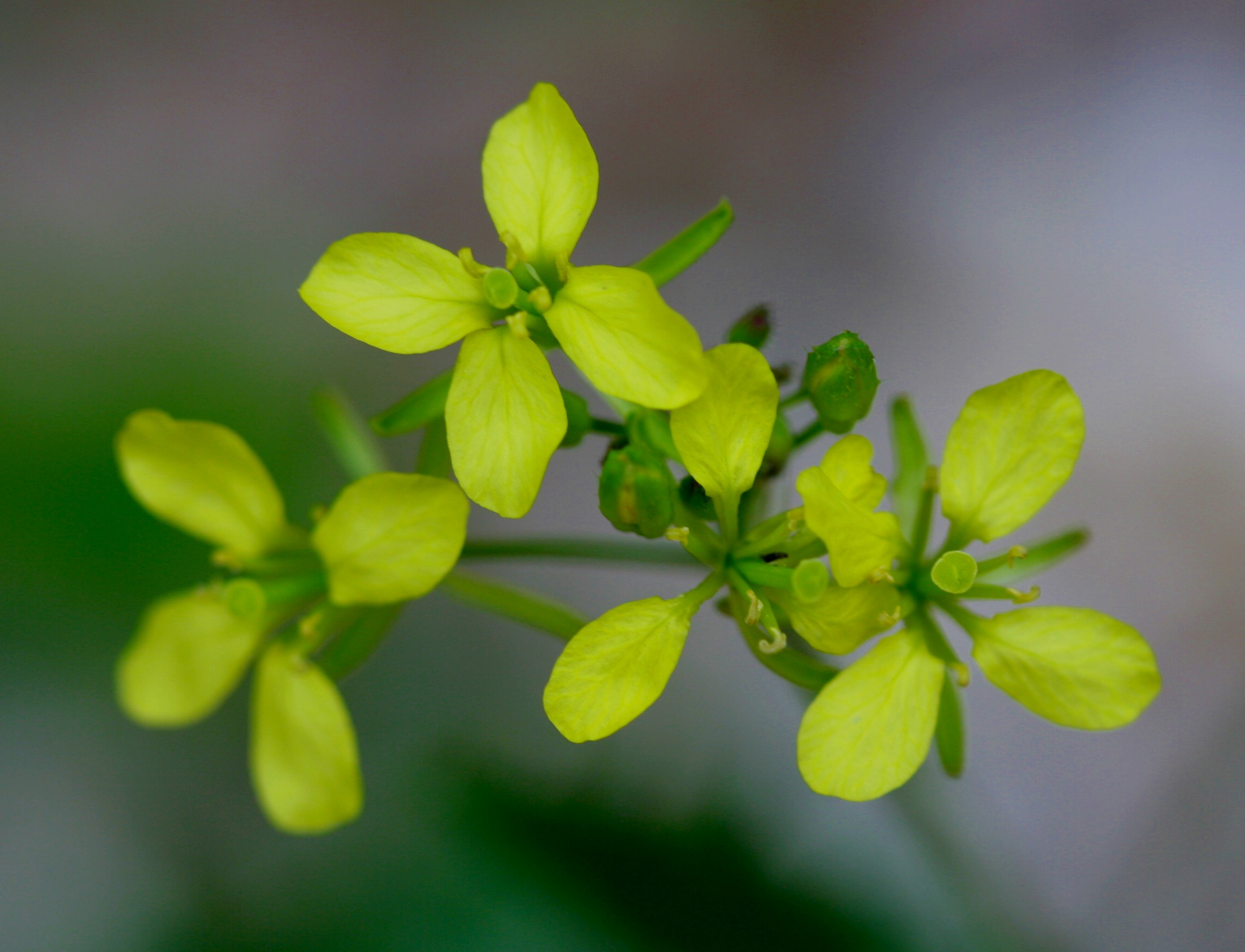 Erucastro comune - Località : Cortina (BL), 1400 m s.l.m.